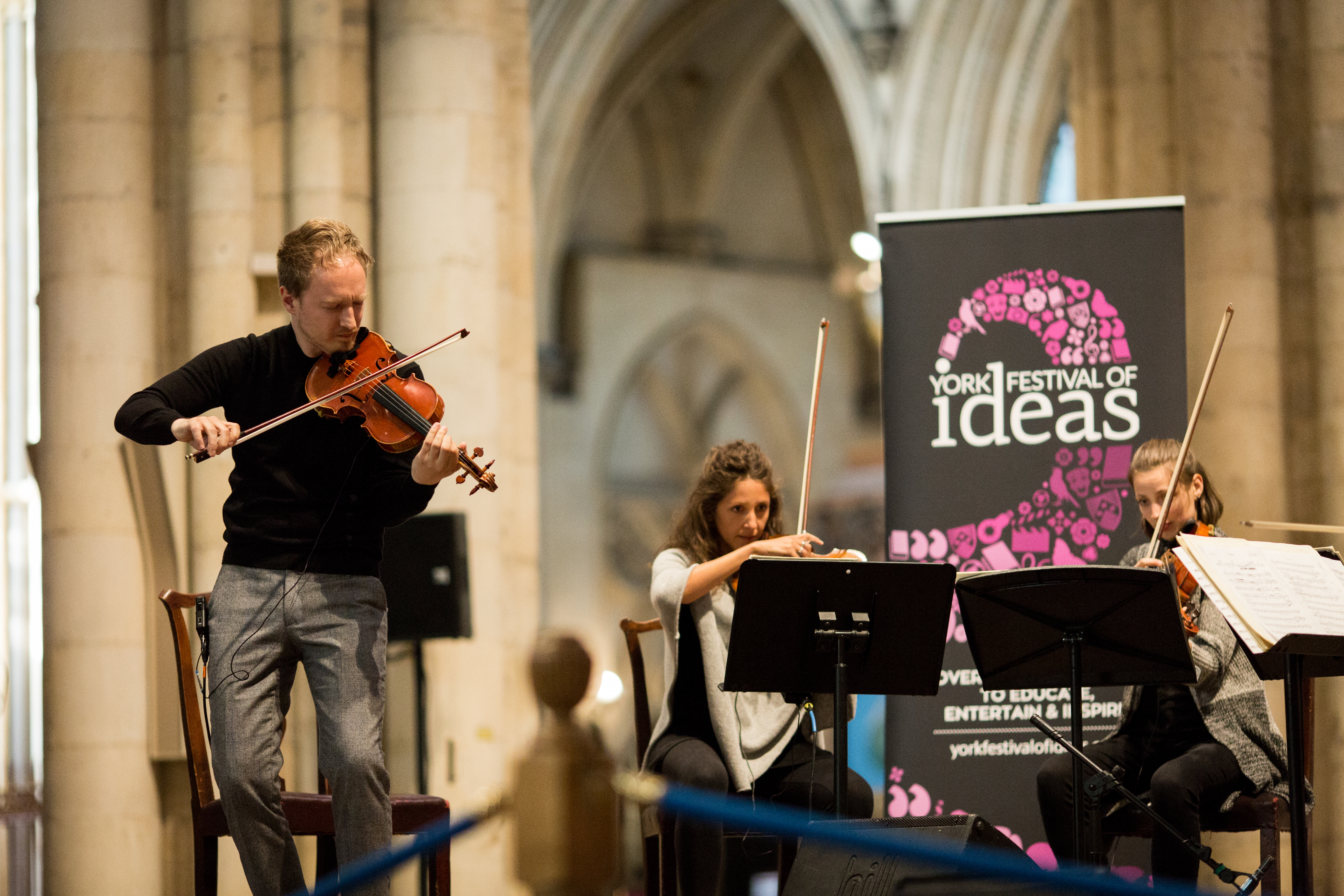 © Ian Martindale